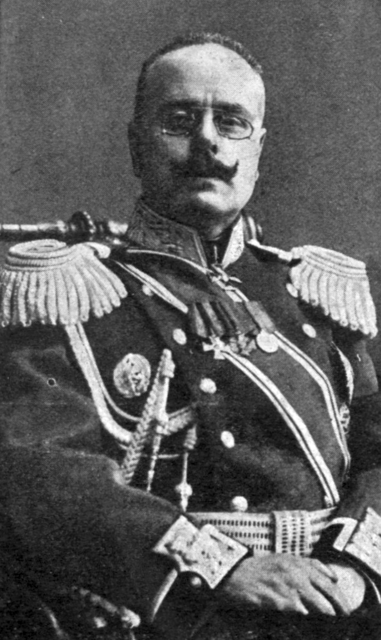 Зейн, Франц-Альберт Александрович